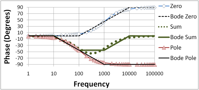 Pole-zero Bode phase plot